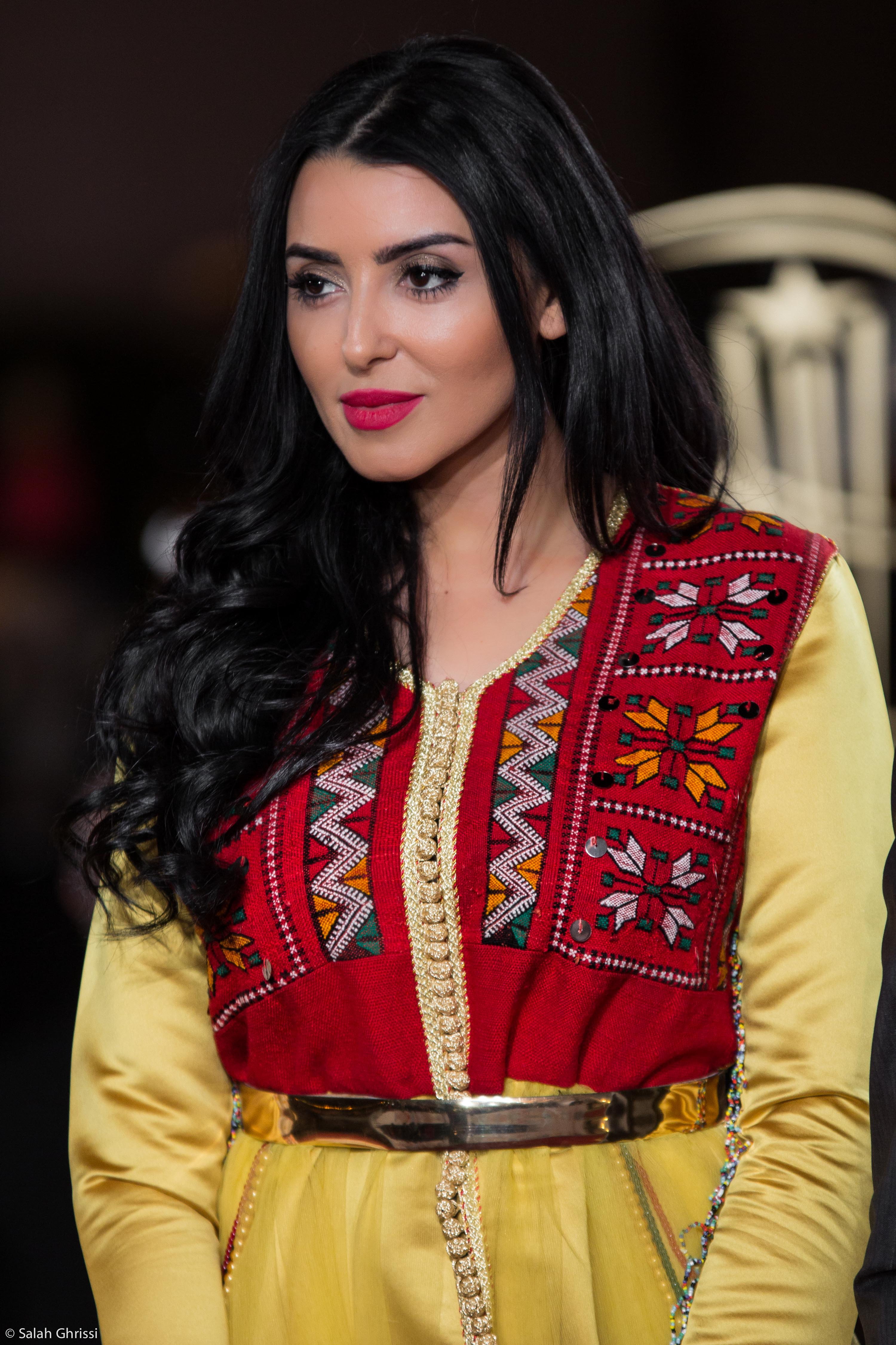 Fati Jamali sur tapis rouge au festival international du film de Marrakech